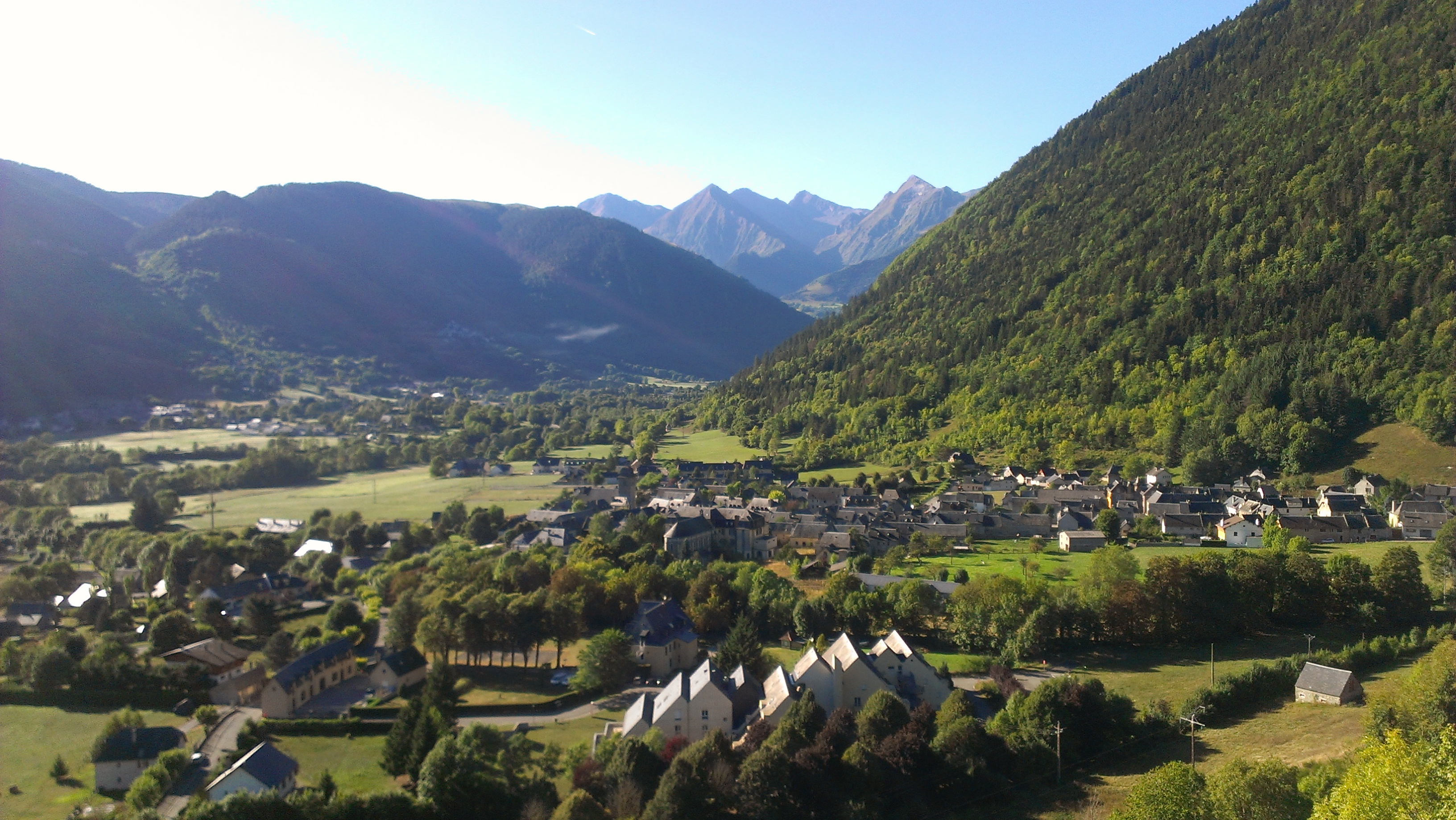 Vue de la commune de Guchen